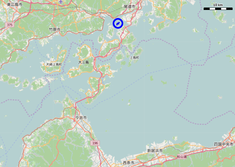 広島県尾道市の細島周辺 This map may be incomplete, and may contain errors. Don't rely solely on it for navigation.